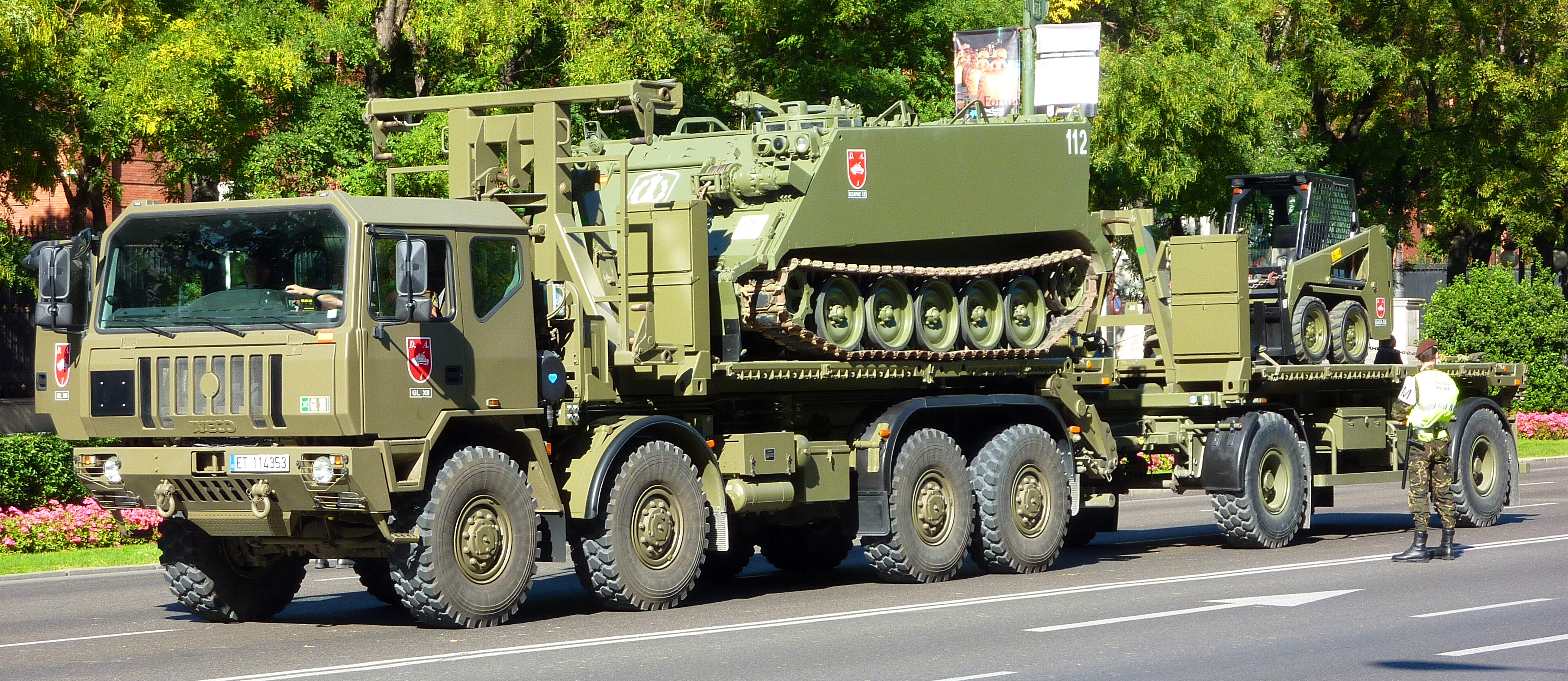 VEMPAR táctico del Ejército Español.